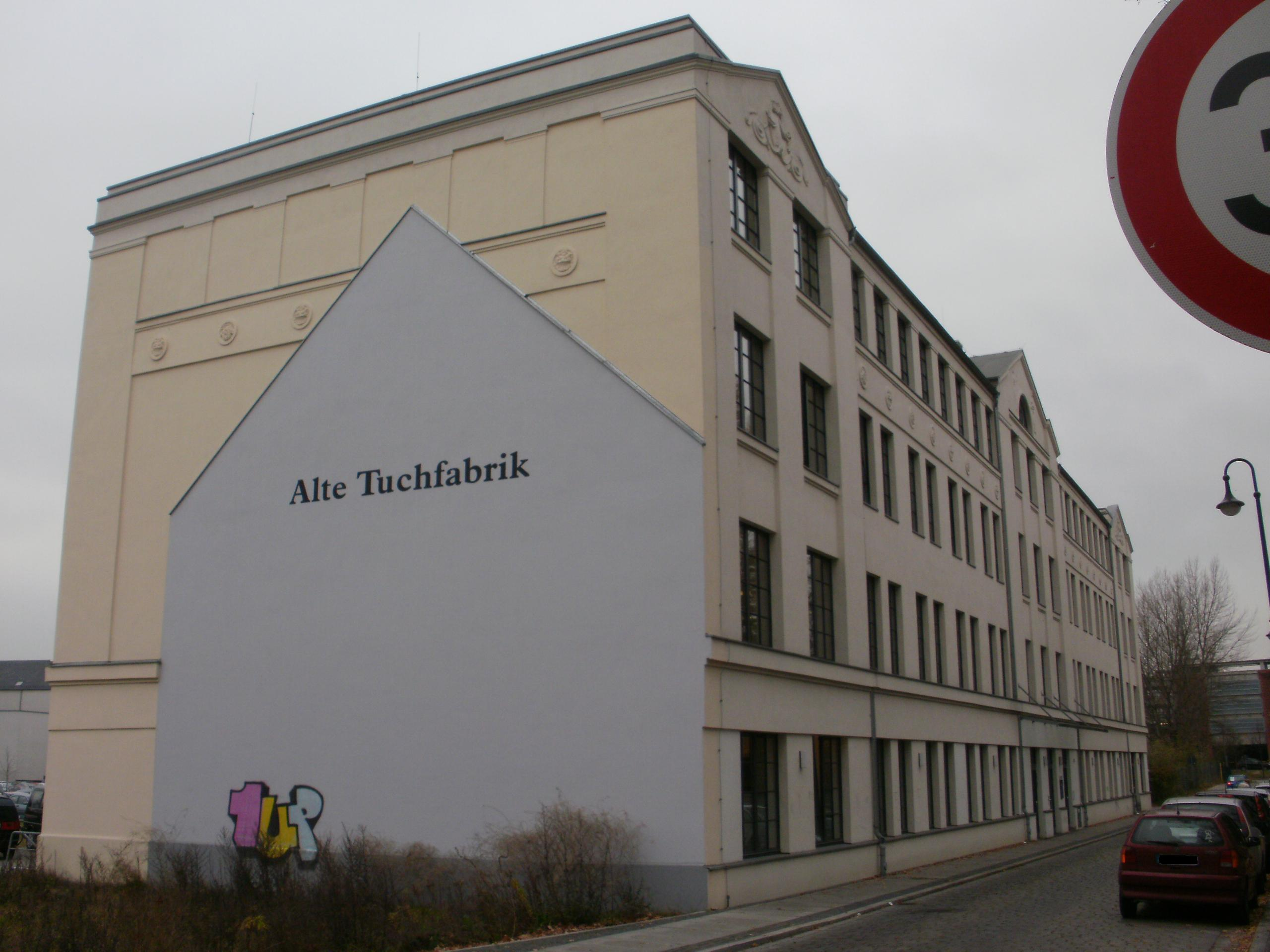 Ehemalige Tuchfabrik Ostrower Damm 20, Cottbus